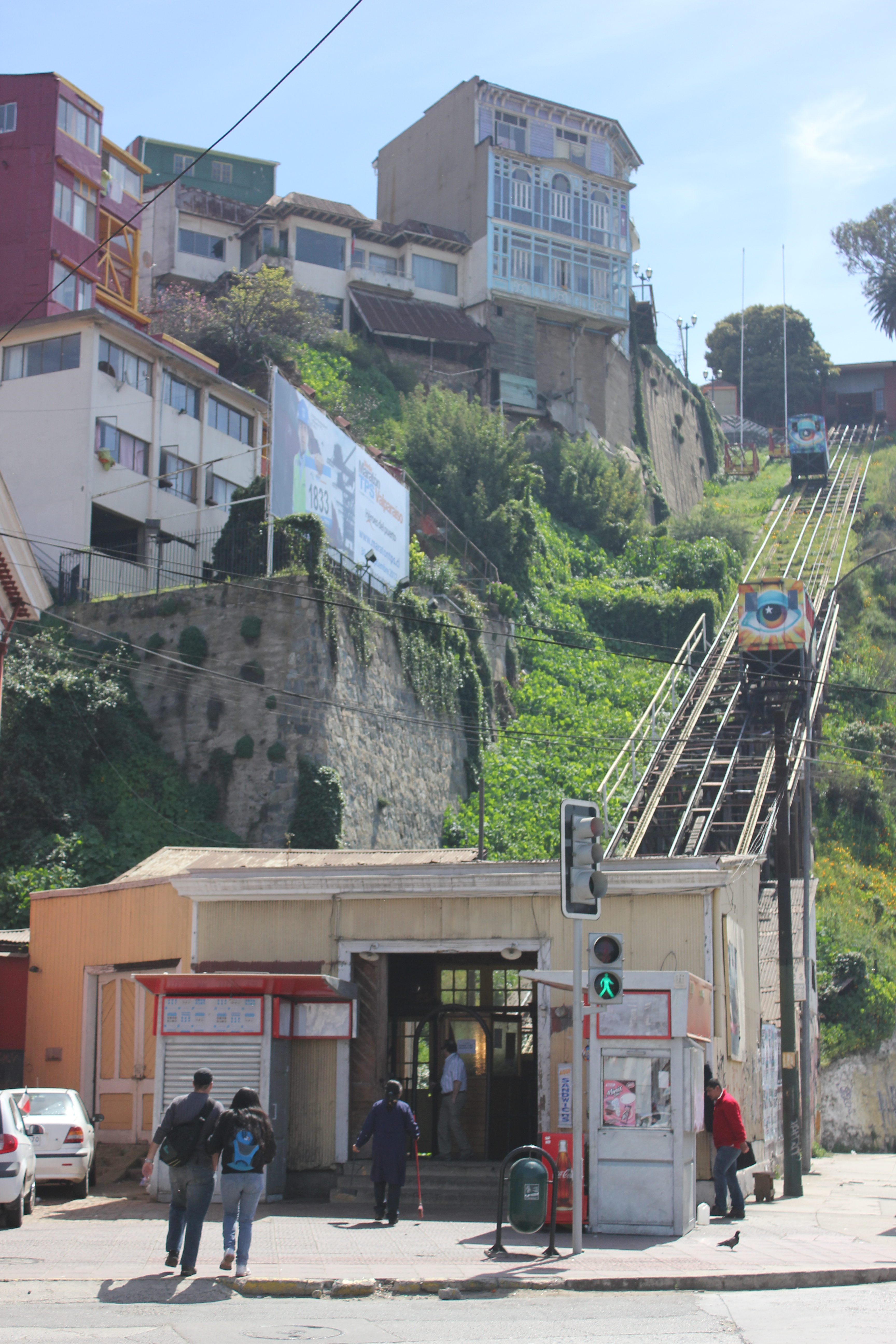 El ascensor artilleria es un medio de transporte urbano el cuál facilita el viaje a los usuarios quienes viven en los altos cerros de Valparaíso a la vez que es uno de los centros turísticos mas visitados. Es uno de los ascensores mas panorámicos de la región dando la ruta para el museo naval marítimo. This is a photo of a national monument in Chile: 773